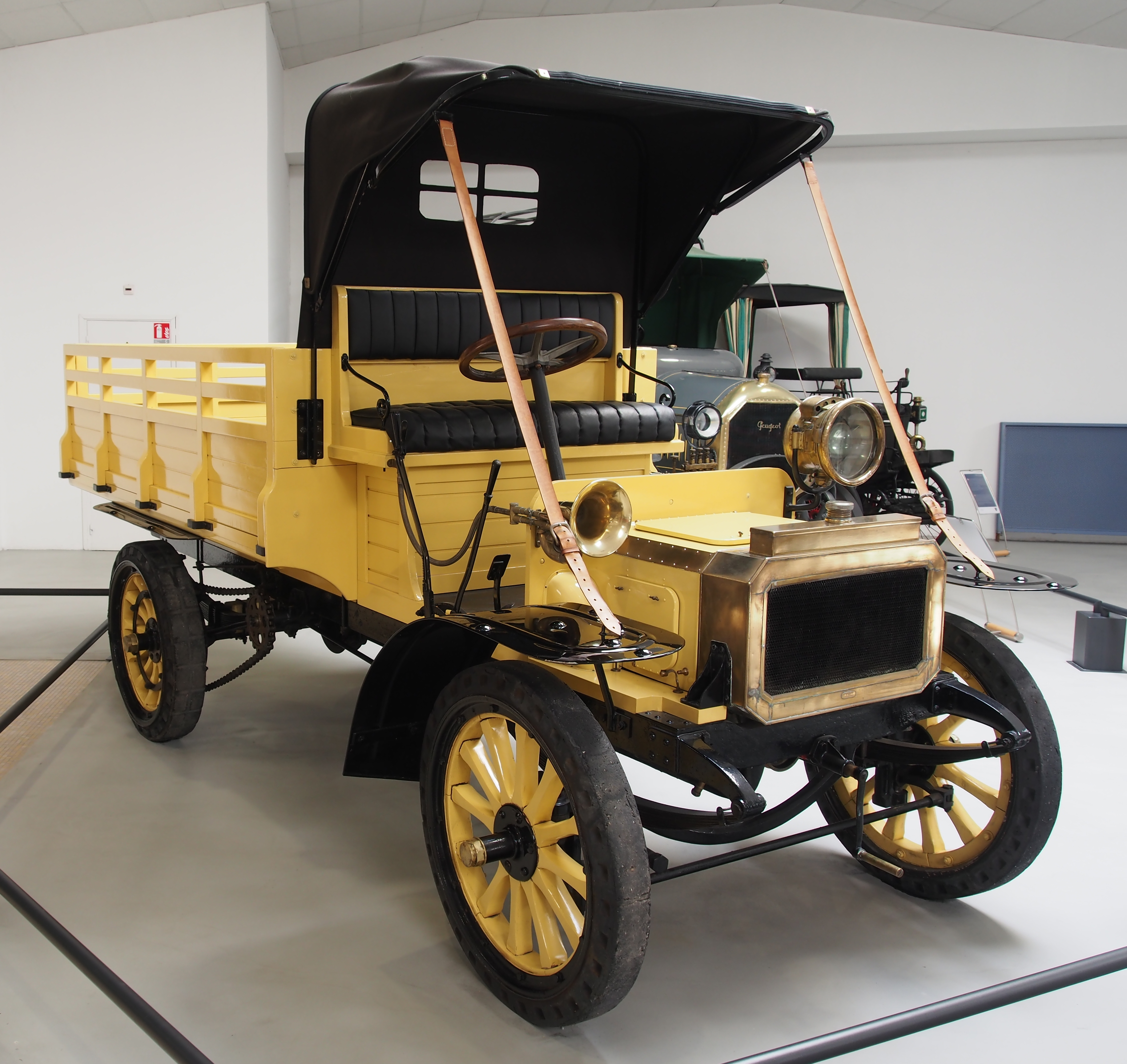 Photographed at the Musée de l'Aventure Peugeot-Sochaux, France.